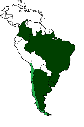 Clasificados de Conmebol para la Copa Mundial de Fútbol de 1962 (Chile era el anfitrión)